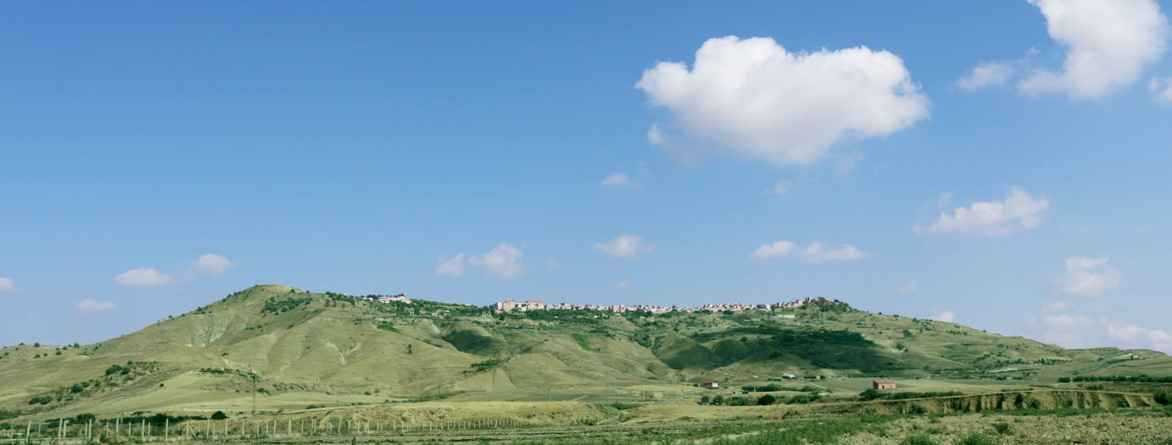 Veduta di Niscemi dalla piana di Gela